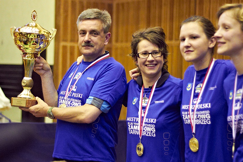 Trener Zbigniew Nęcek z pucharem Drużynowych Mistrzostw Polski w Tenisie Stołowym wywalczonym w sezonie 2011/2012 przez tenisistki klubu KTS Zamek-OWG Tarnobrzeg. Obok trenera kolejno: Renata Štrbíková, Katarzyna Ślifirczyk i Kinga Stefańska